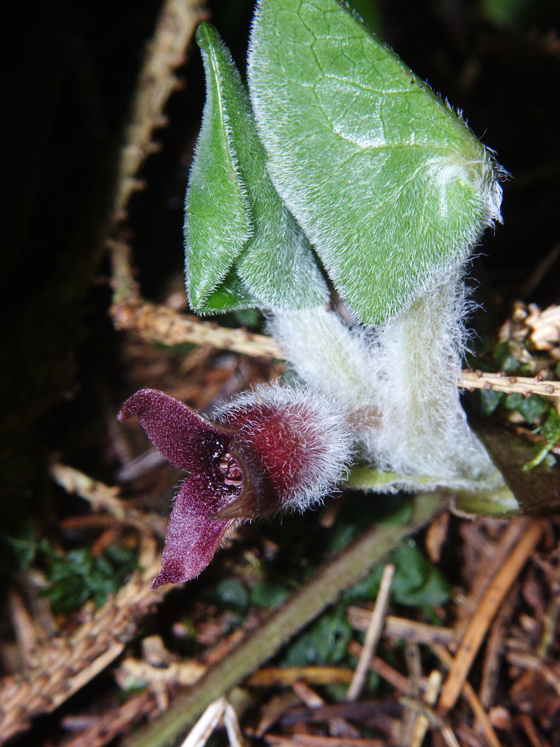 Asarum europaeum, Schwäbisch-Fränkischer Wald, Germany